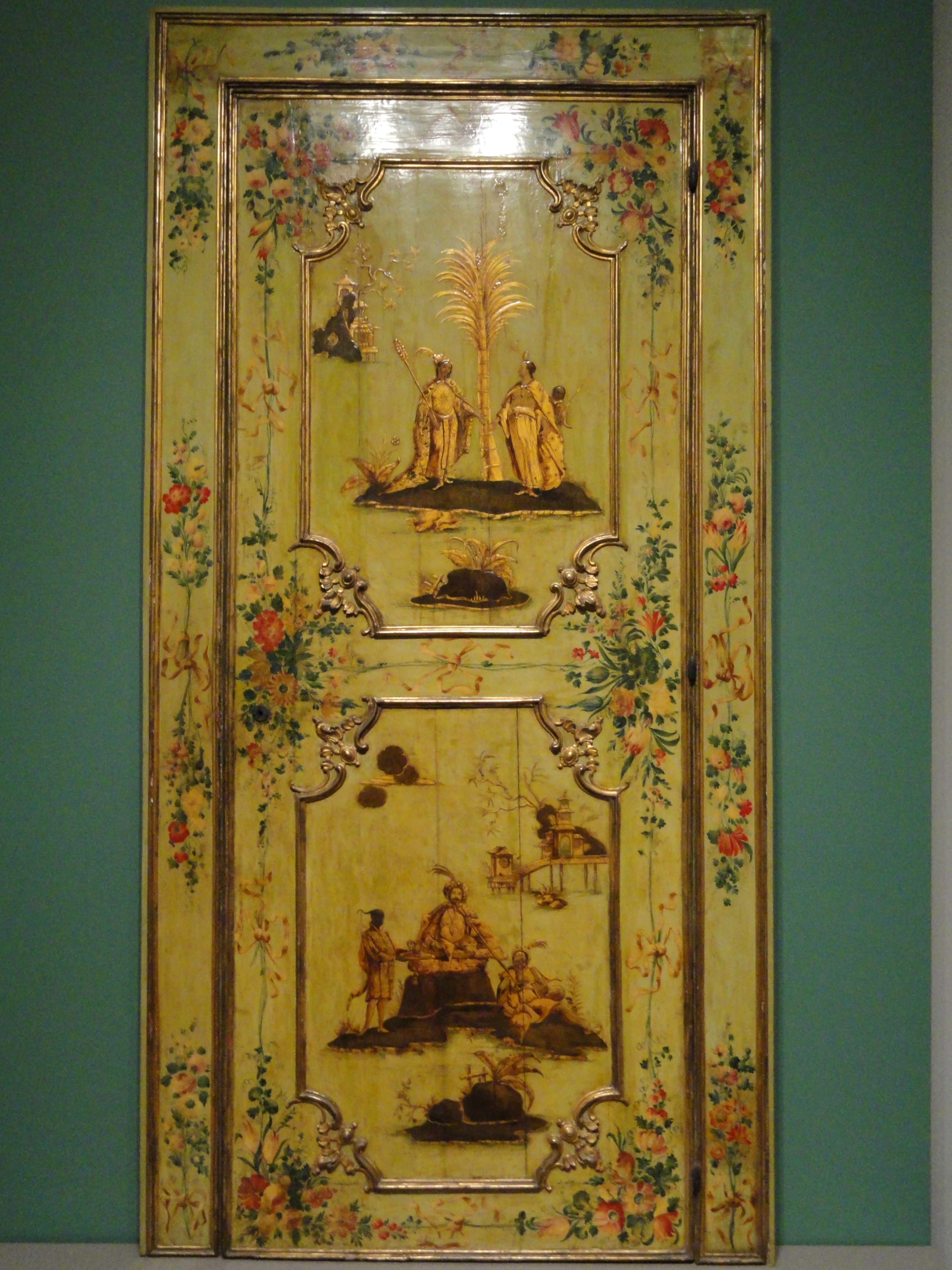 Door